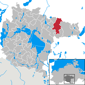 Möllenhagen im Landkreis Müritz, Mecklenburg-Vorpommern